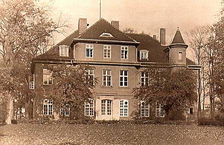 Schloss Bellevue bei Köpenick, zerstört